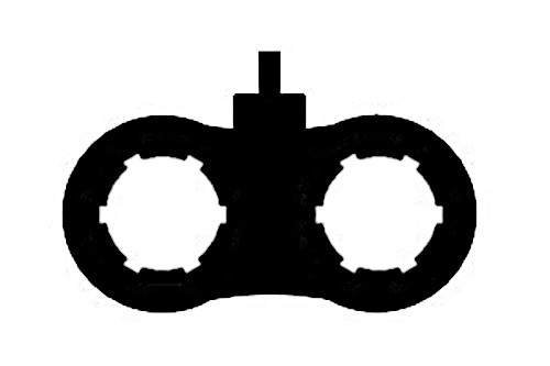 Laufbündelung einer Doppelbüchse.